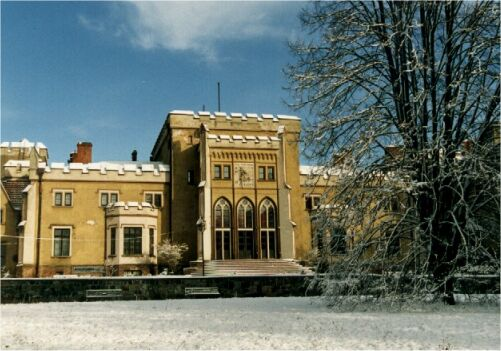 Das Jarotschiner Schloss